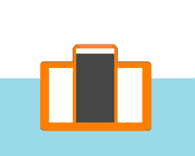 Schematischer Laderaumschnitt eines Turretdeckers